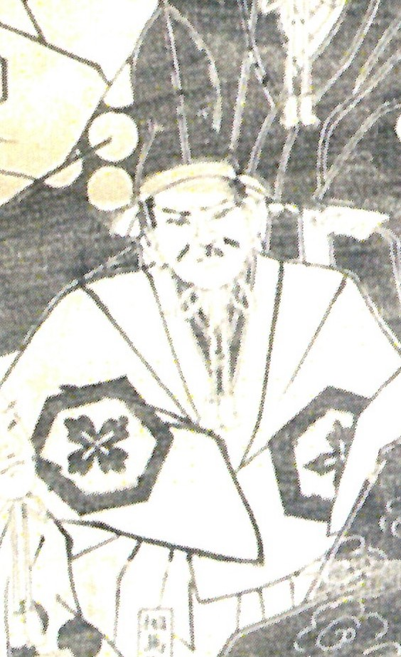 相馬尊胤の画像(「相馬家歴代藩主像」より)。